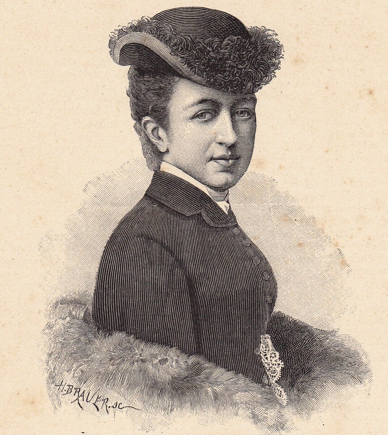 Marie Adrienne Anne Clémentine de Rochechouart de Mortemart, duchesse d'Uzès (1847-1933)